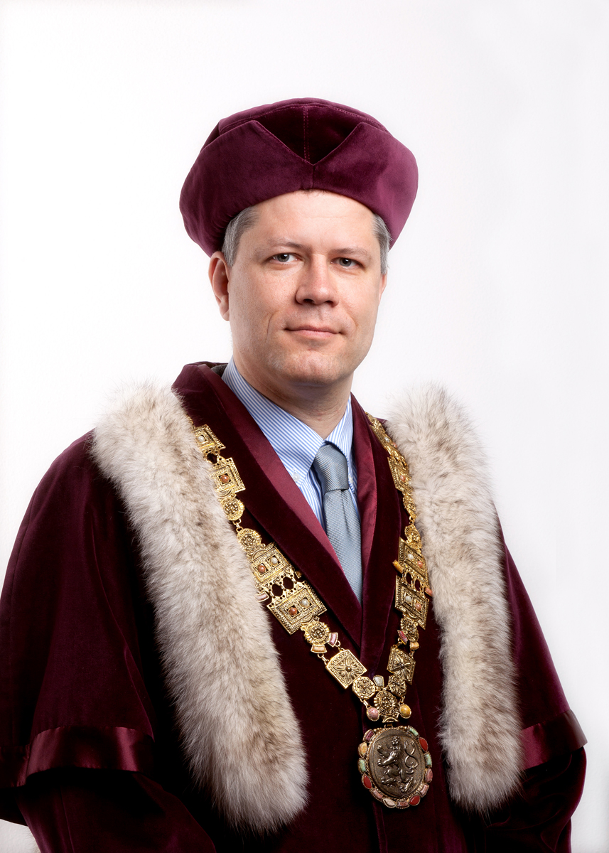 Rektor Jihočeské univerzity Tomáš Machula